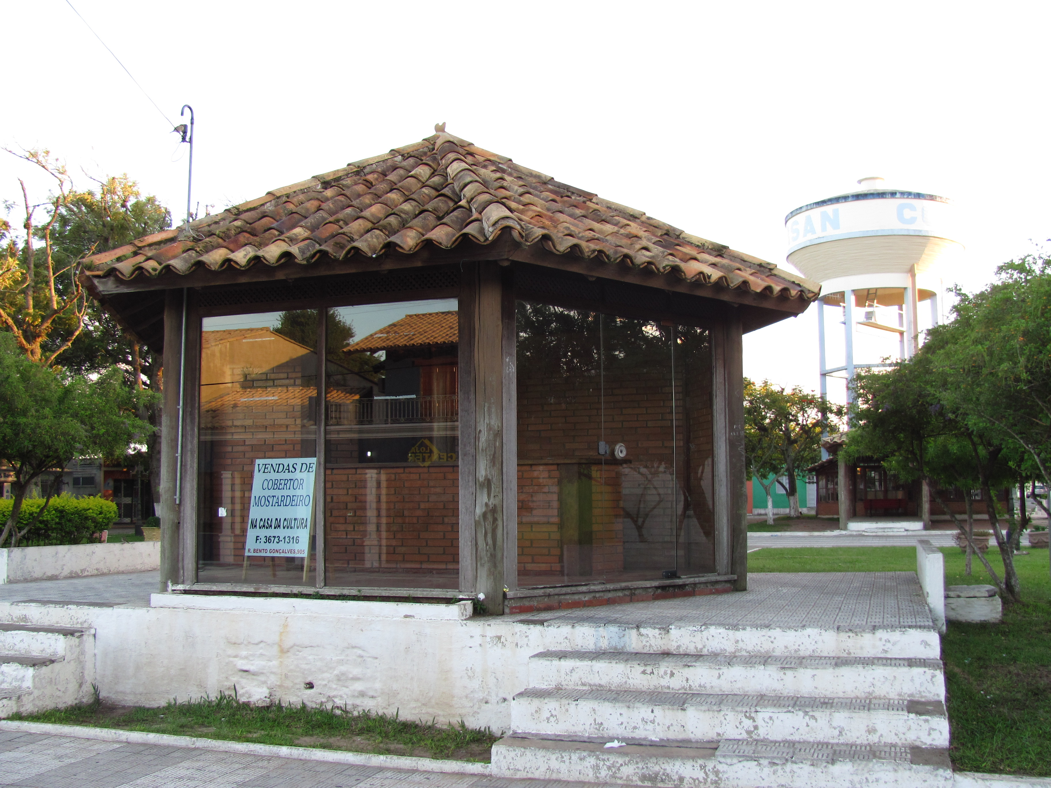 Praça central de Mostardas quiosque